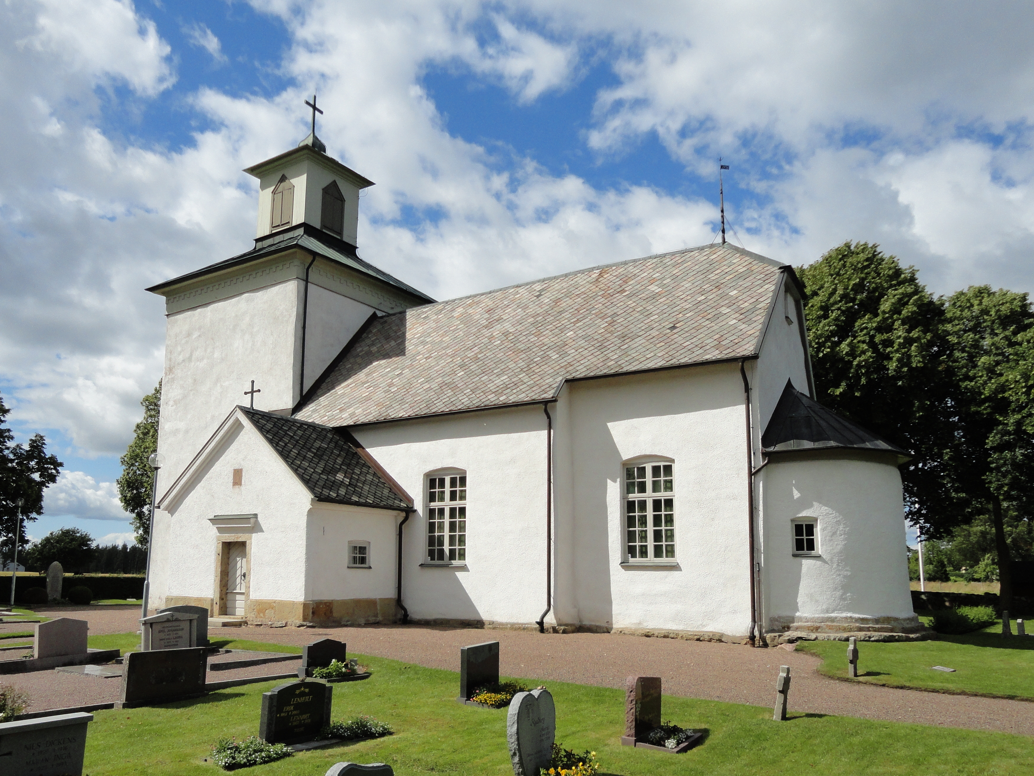 Skeby kyrka, Götene kommun.